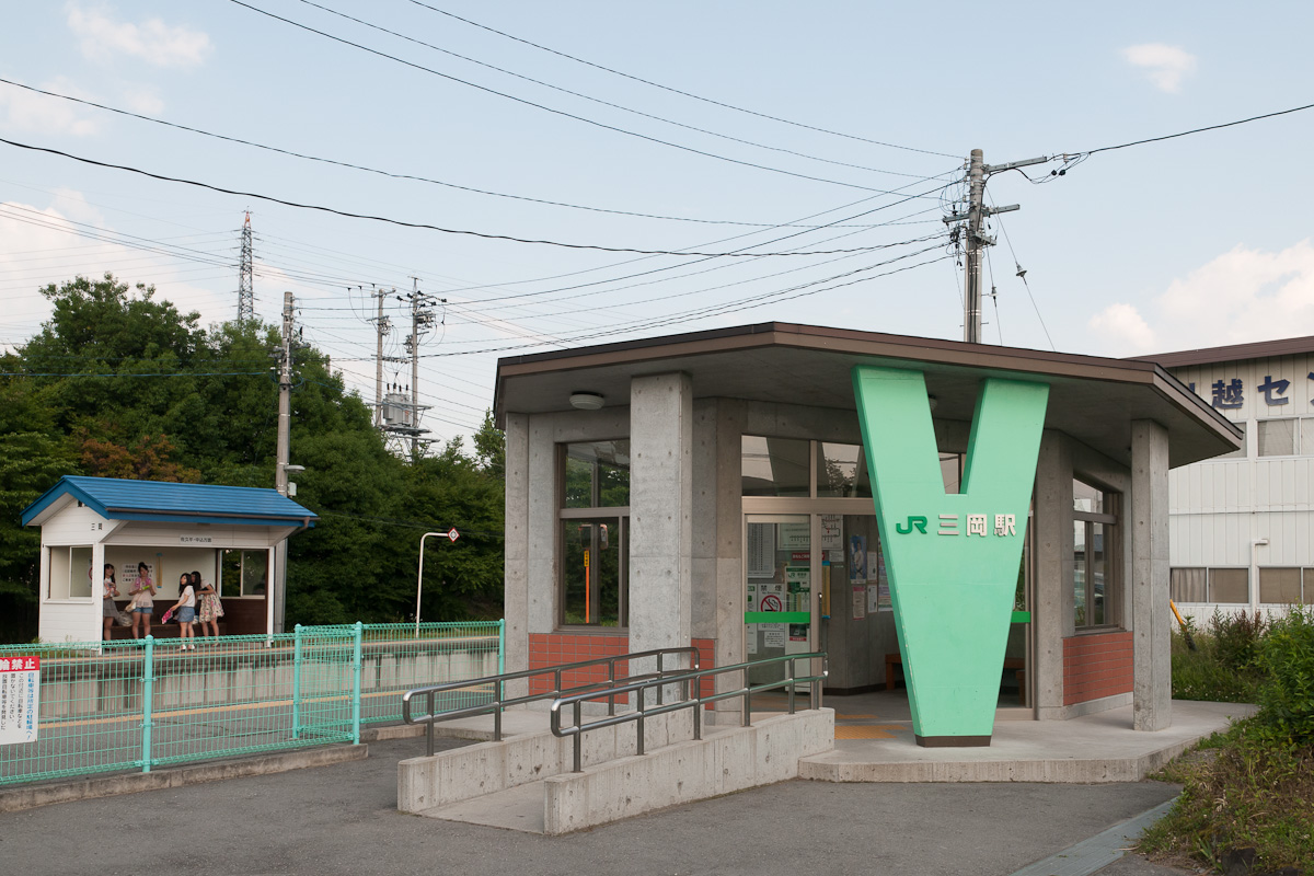 JR東日本小海線三岡駅。